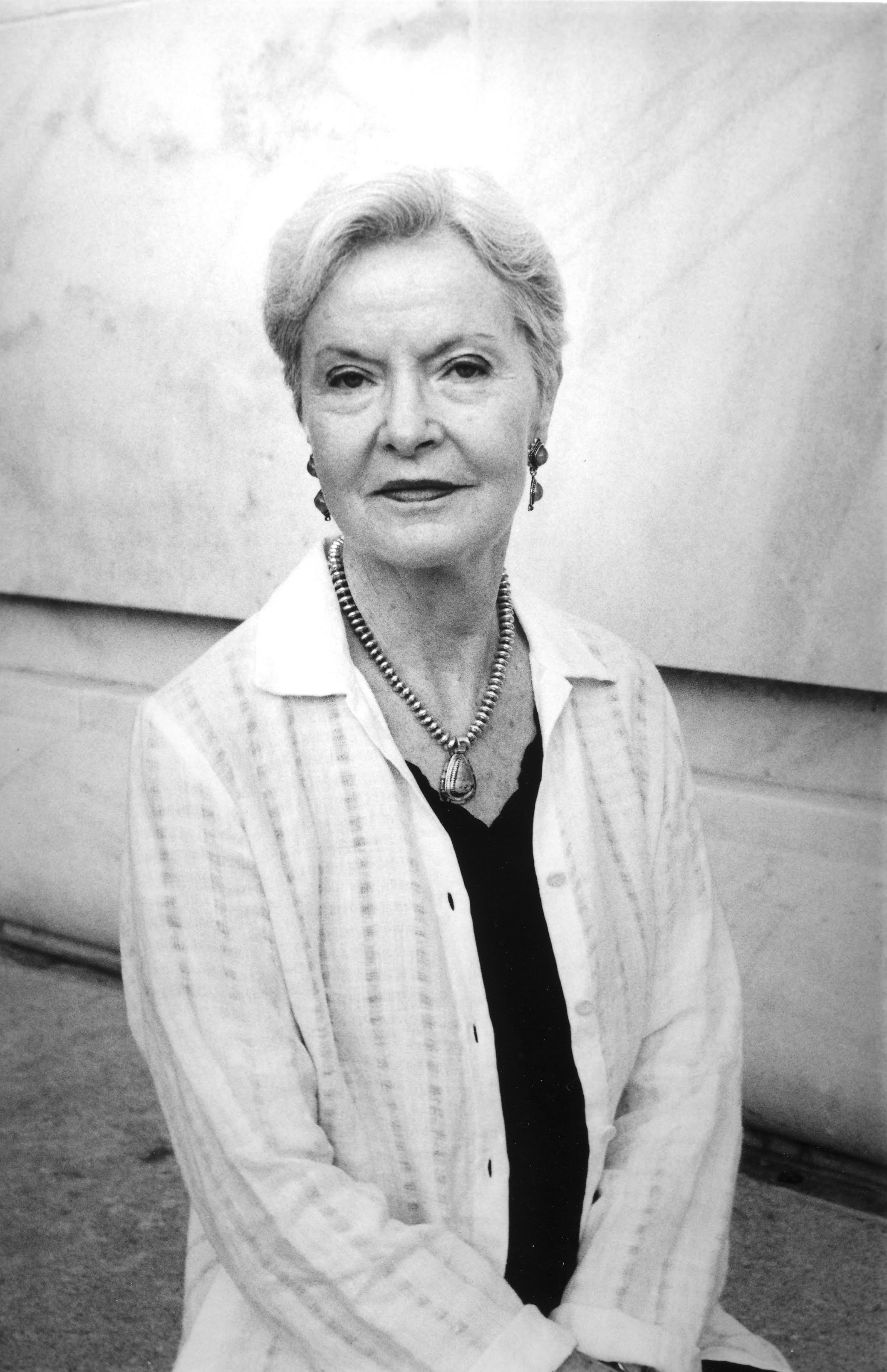 Photo de Catharine Savage Brosman